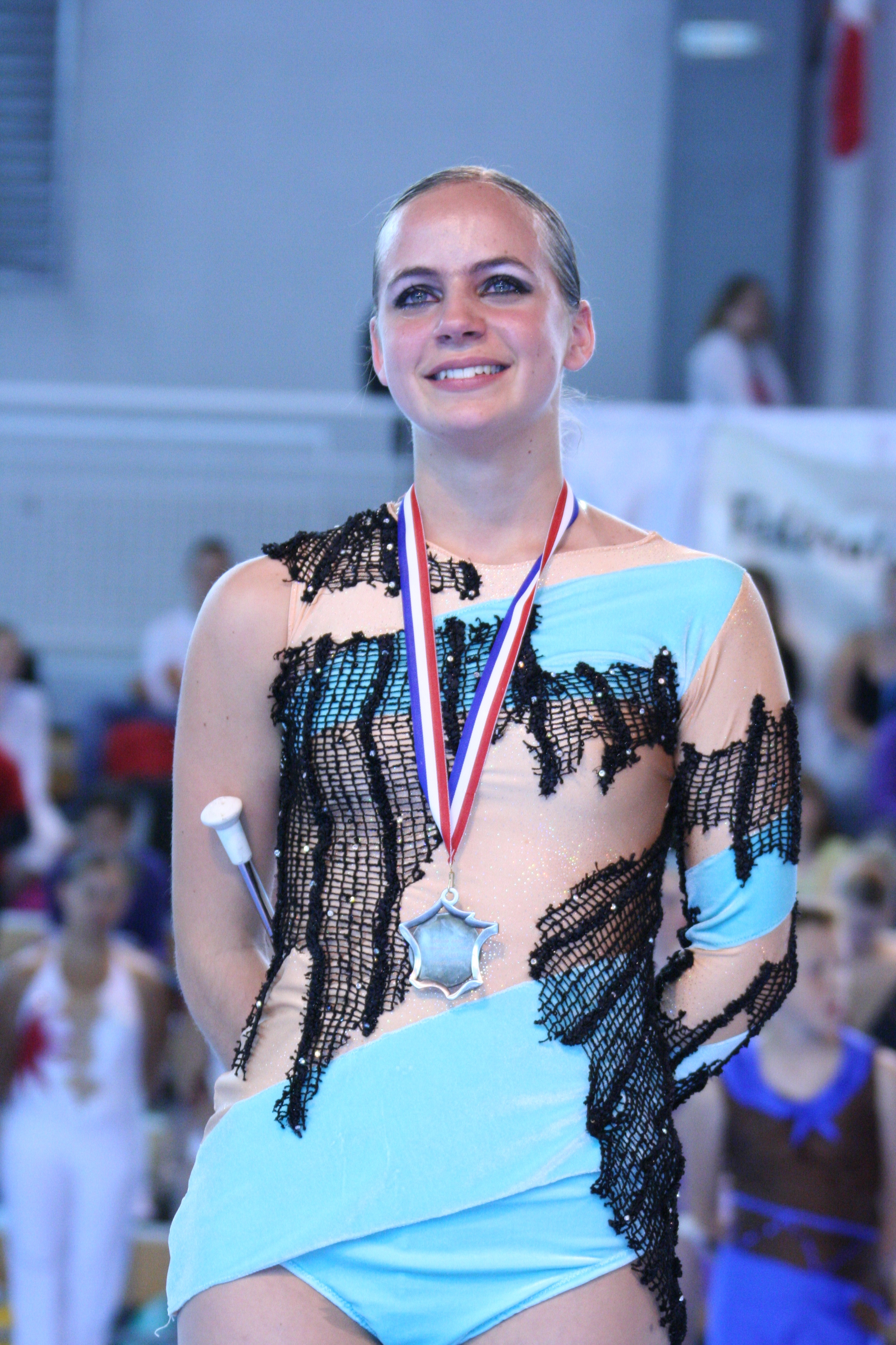 Mérédith Loppinet sacrée vice championne de France 2007 à Bourgoin Jallieu